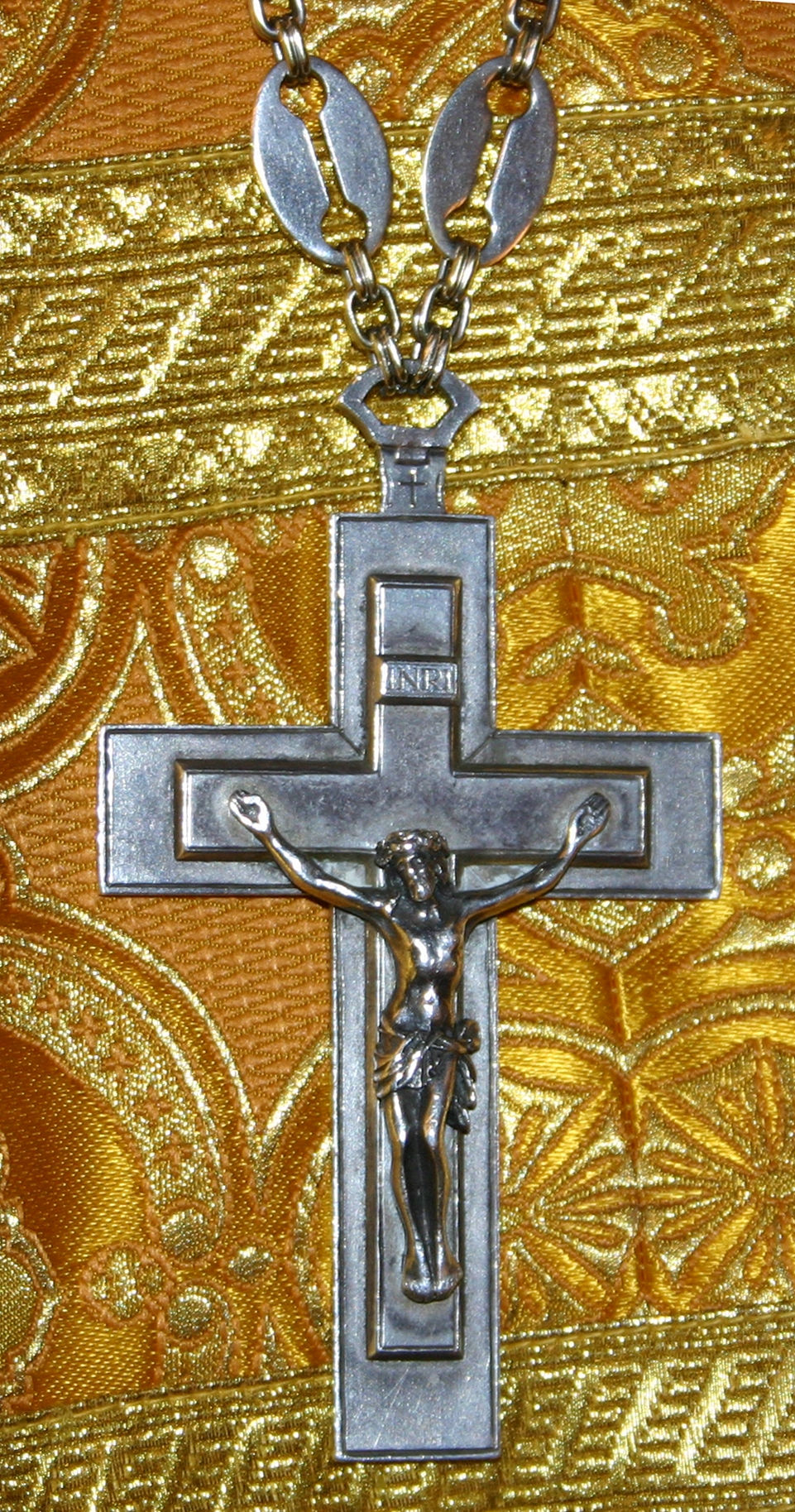 Ortodoksisen pastorin tai pappismunkin hopeinen papinristi